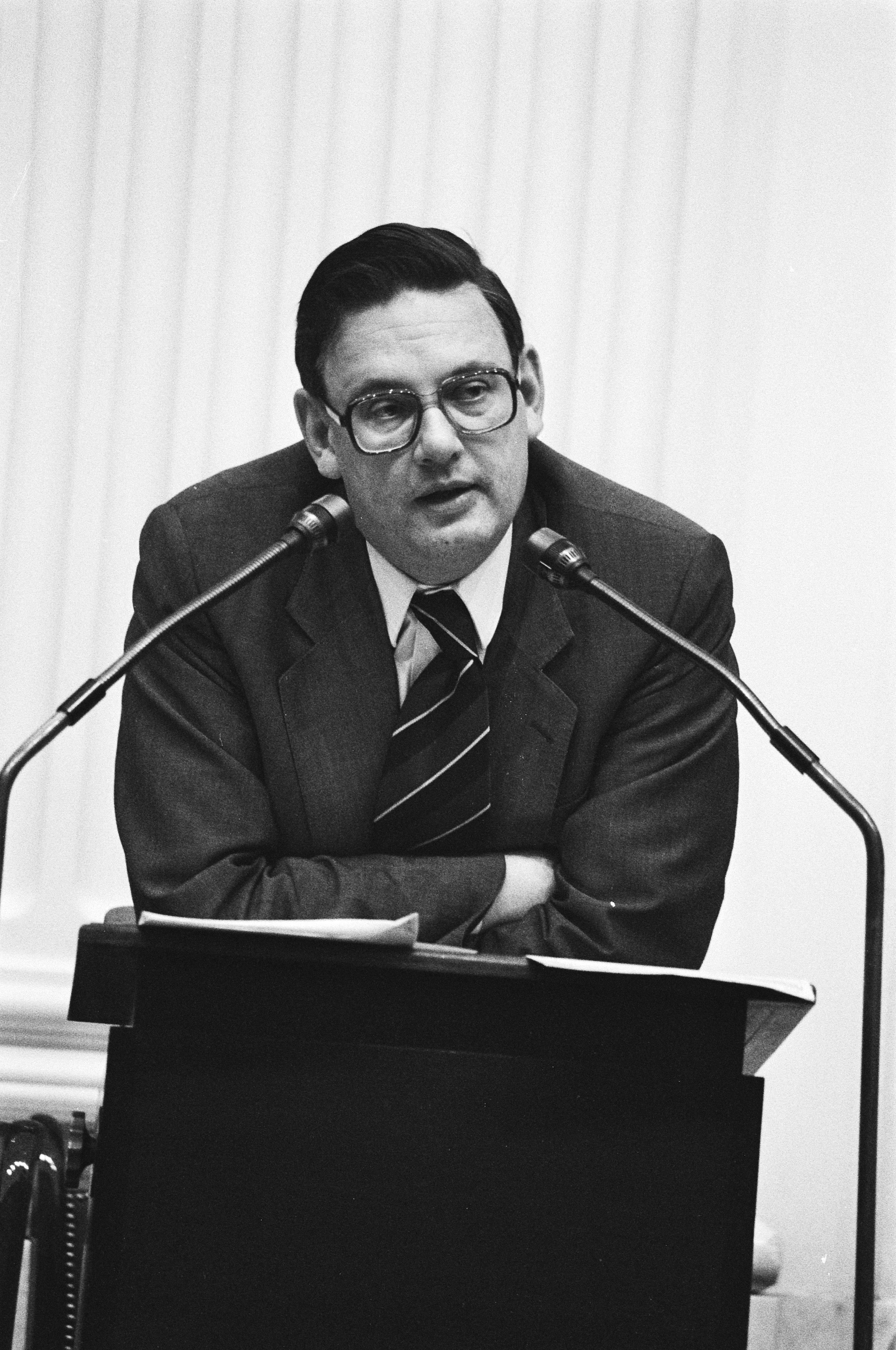 Collectie / Archief : Fotocollectie Anefo Reportage / Serie : [ onbekend ] Beschrijving : Tweede Kamer debat, minister Van Aardenne Datum : 19 oktober 1978 Locatie : Den Haag, Zuid-Holland Trefwoorden : ministers, parlementaire debatten, politiek, portretten Persoonsnaam : Aardenne, G.M.V. van Fotograaf : Suyk, Koen / Anefo Auteursrechthebbende : Nationaal Archief Materiaalsoort : Negatief (zwart/wit) Nummer archiefinventaris : bekijk toegang 2.24.01.05 Bestanddeelnummer : 929-9554